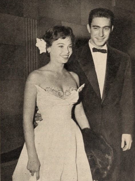 Leslie Caron wed George "Geordie" Hormel in September 1951